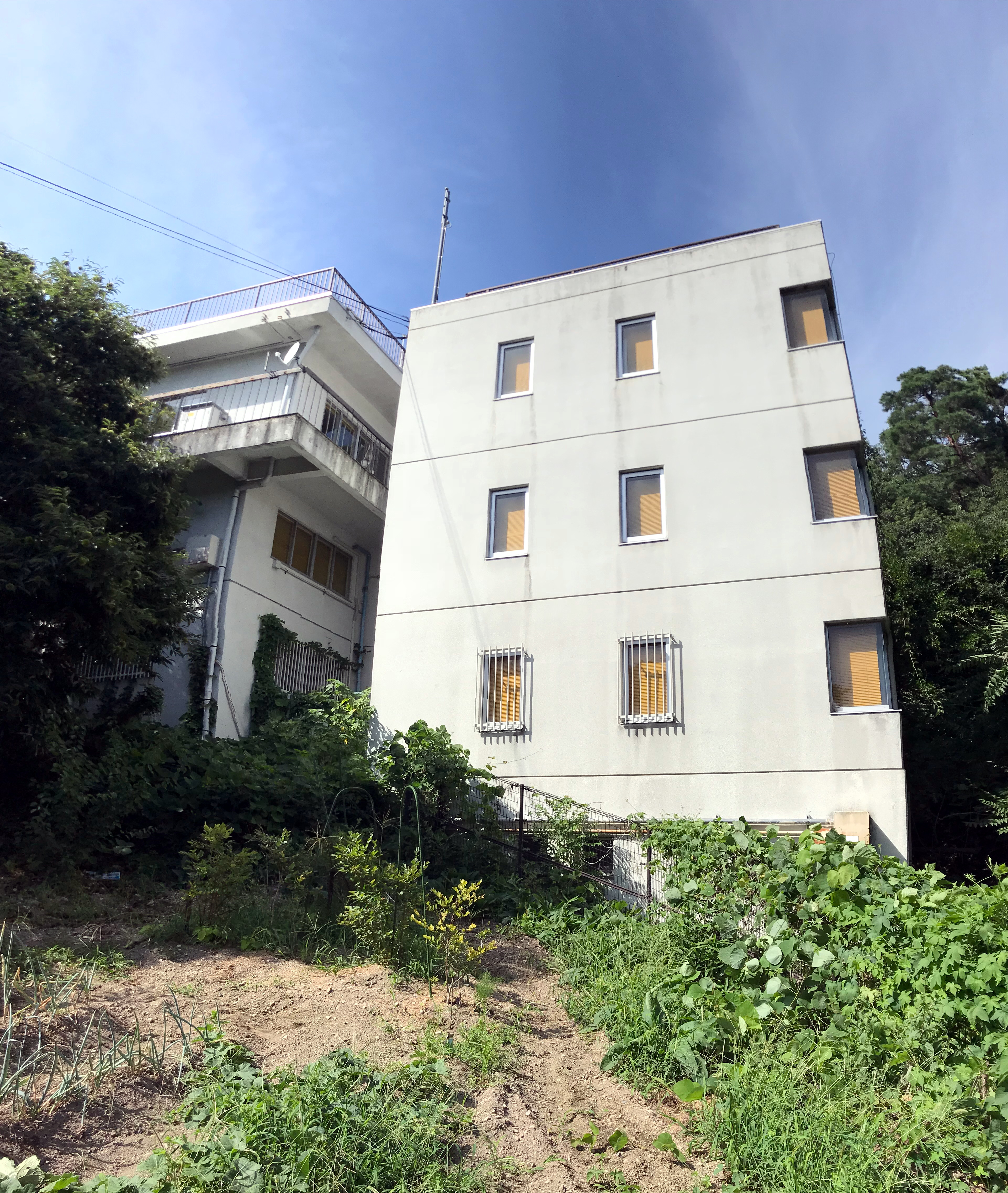 東京大学地震研究所信越地震観測所、建物全景。 傾斜地にある建物のため 最上階が出入り口で、下に観測室や控え室が配置されている。